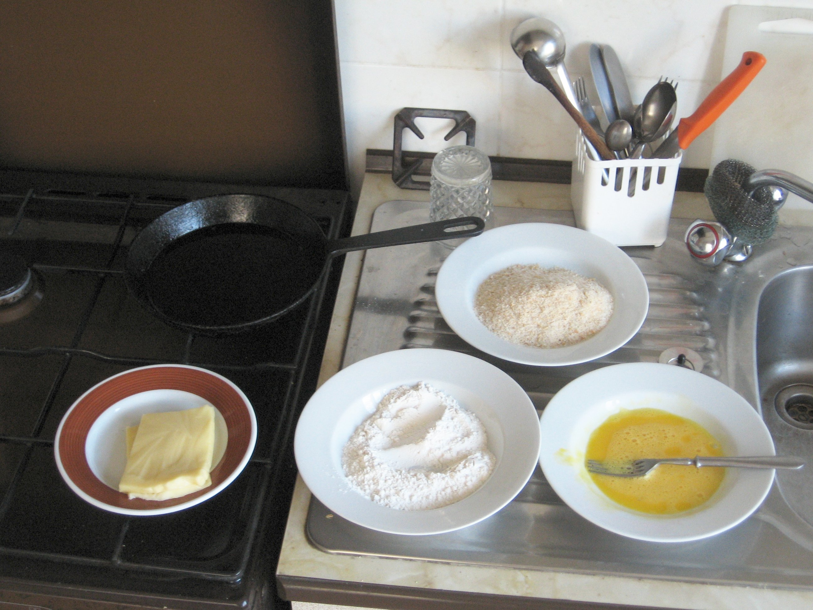 suroviny na smažený sýr: mouka, rozšlehané vajíčko, strouhanka, plátek sýra eidam